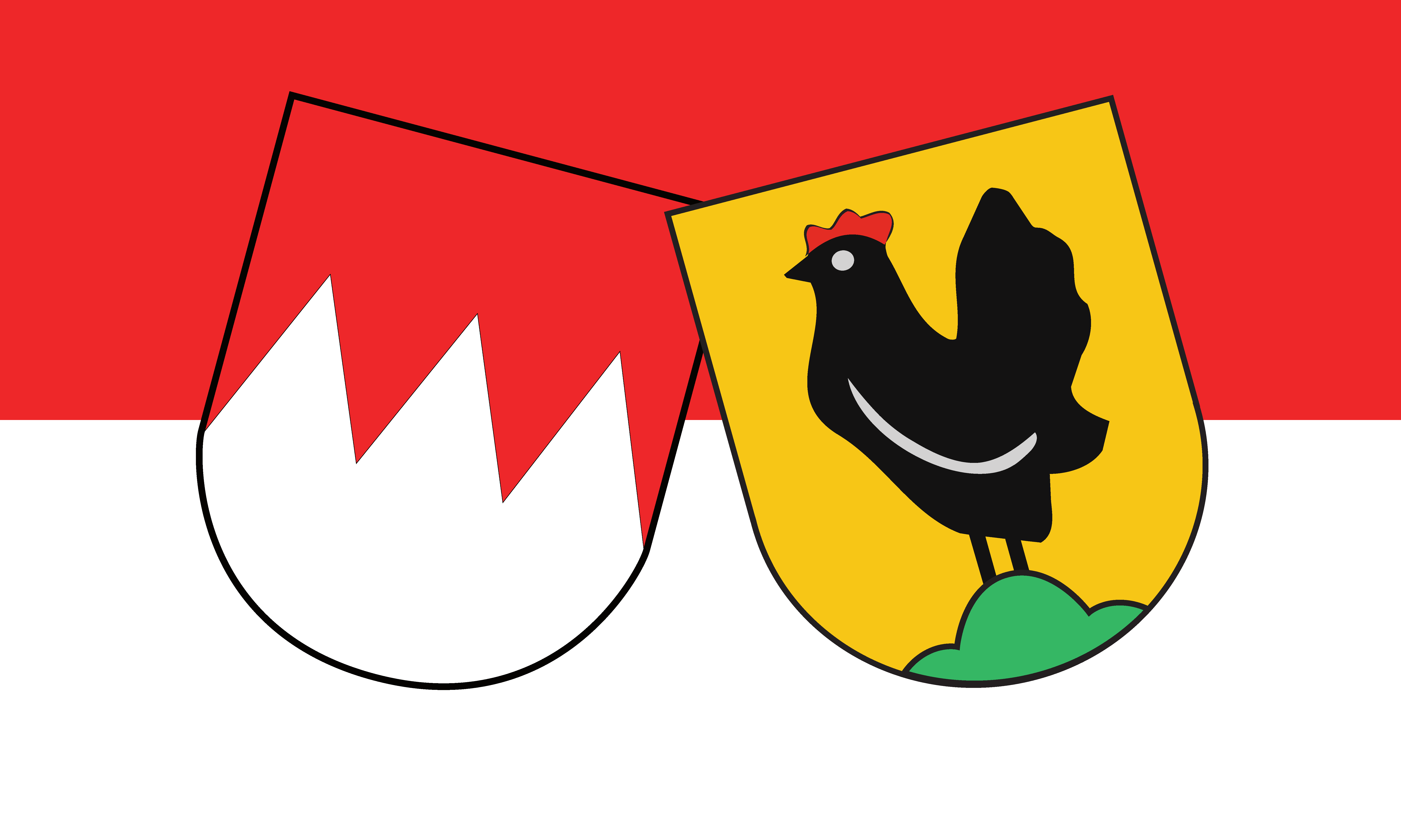 Flagge Henneberg-Franken